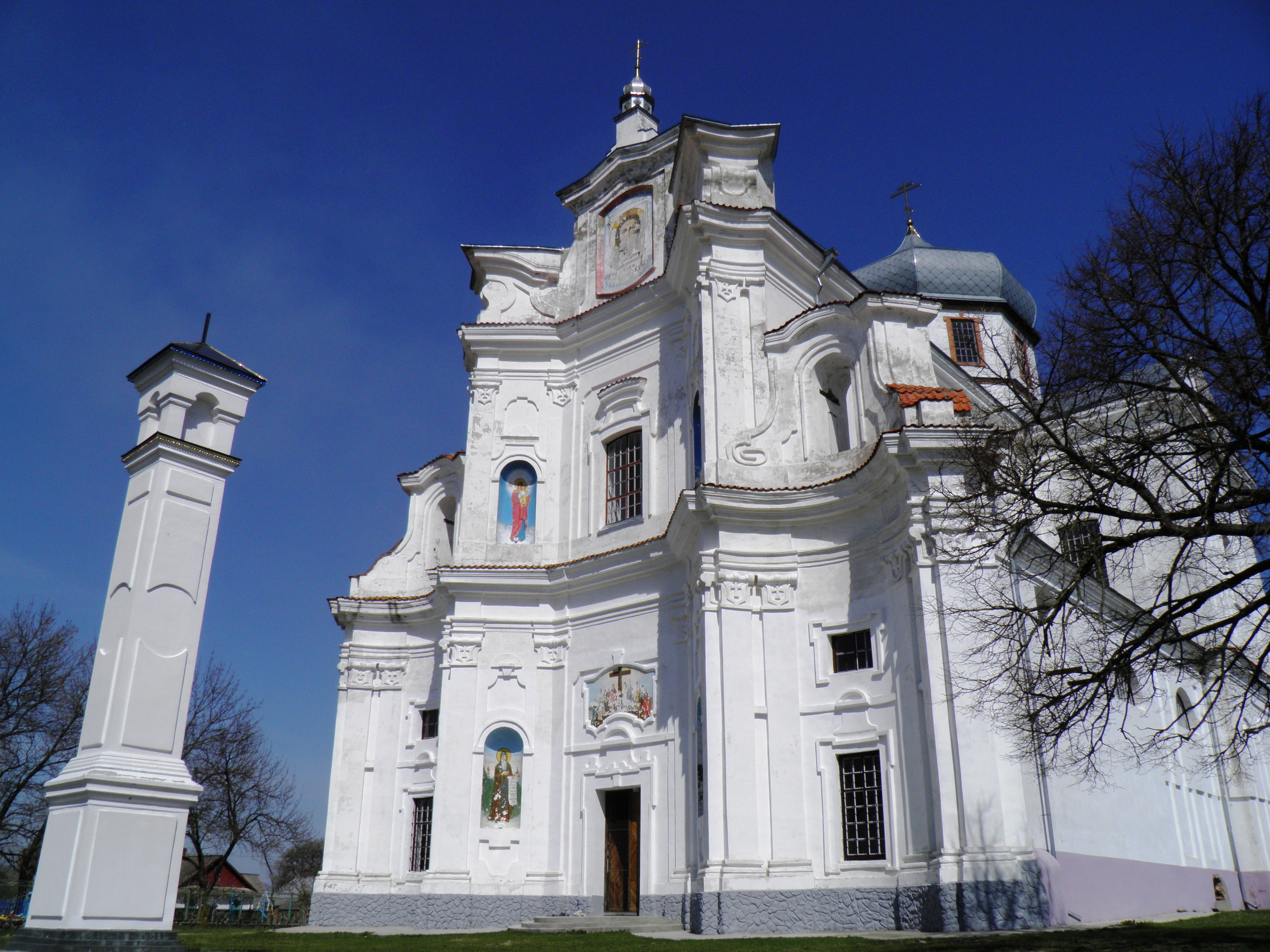 Старий Чарторийськ. Домініканський костел, 1741-53